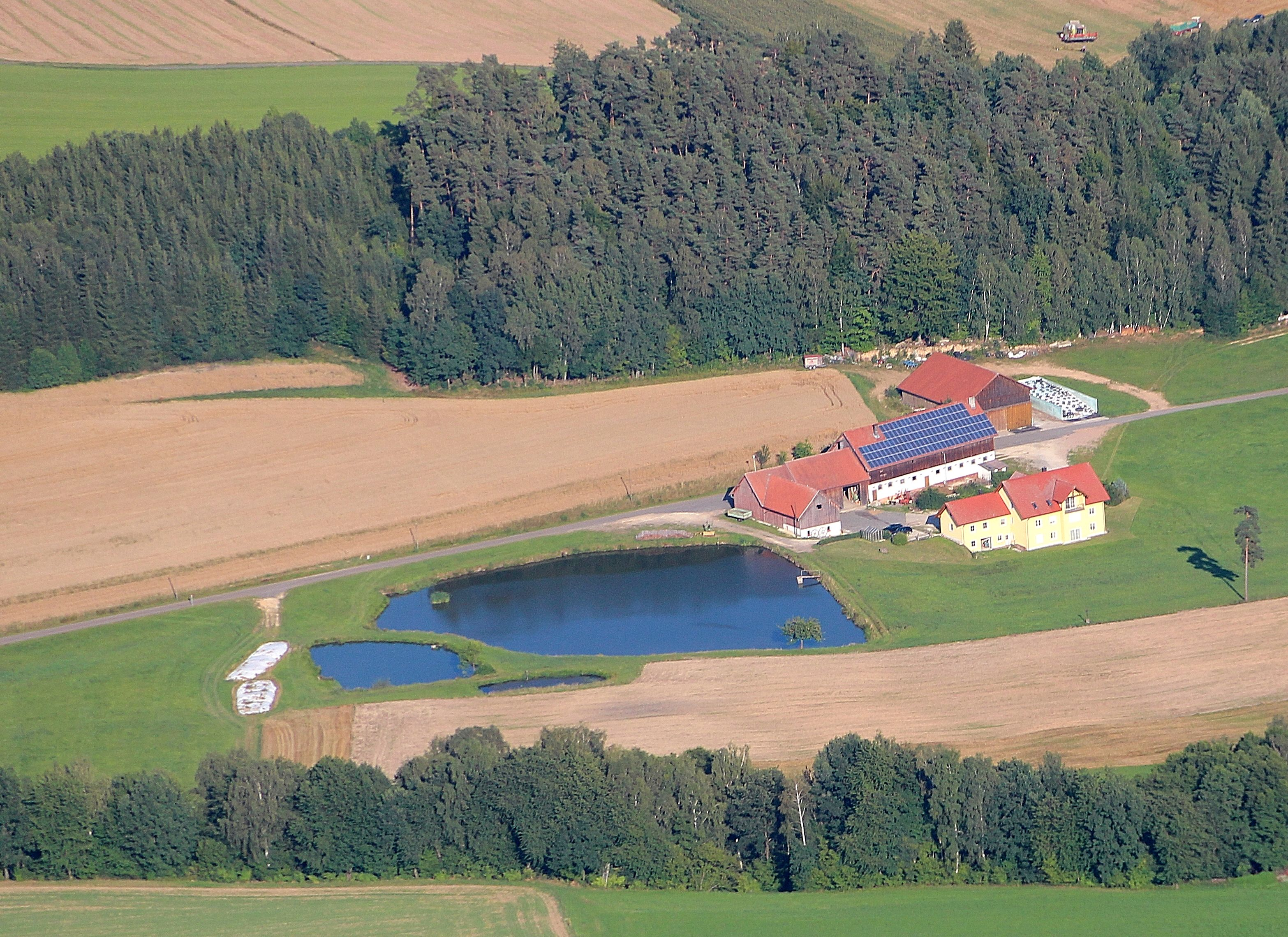 Miesmühle, Gemeinde Teunz, Landkreis Schwandorf, Oberpfalz, Bayern (2012)